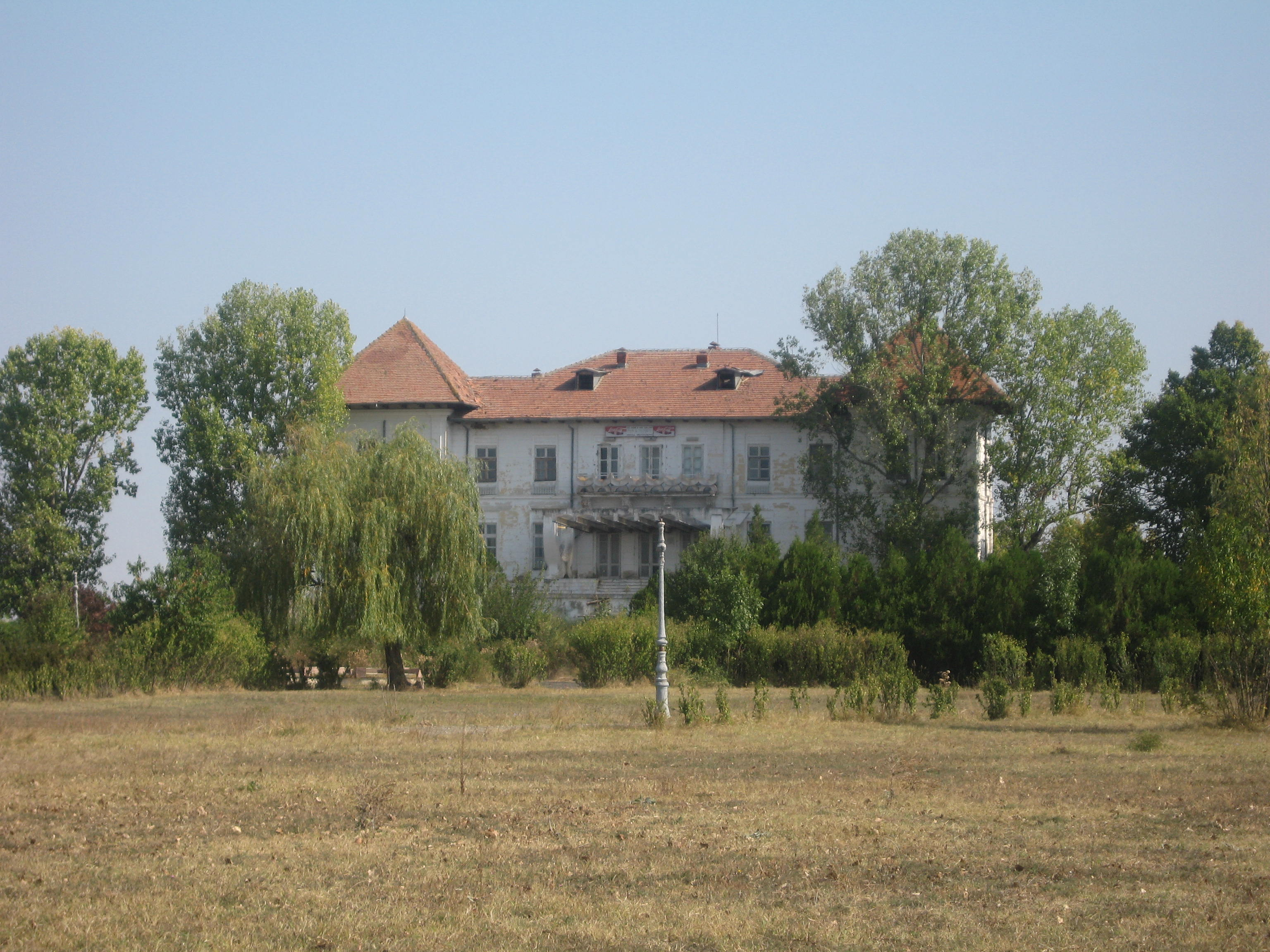 Conacul poetului Costache Conachi din Ţigăneşti, jud. Galaţi,. România